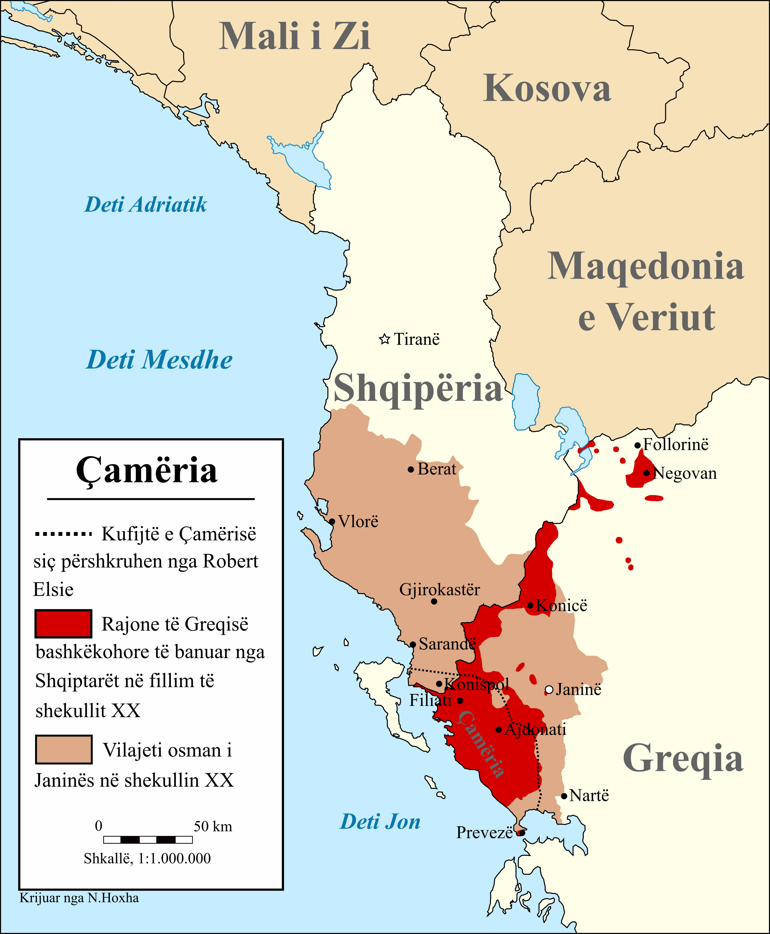 Harta ilustron skicat e rajonit historik të Çamërisë, siç përshkruhet nga Robert Elsie. Harta tregon gjithashtu vilajetin osman të Janinës dhe territoret e përafërta në Greqinë bashkëkohore me përqendrime të larta të shqiptarëve në fillim të shekullit xx.